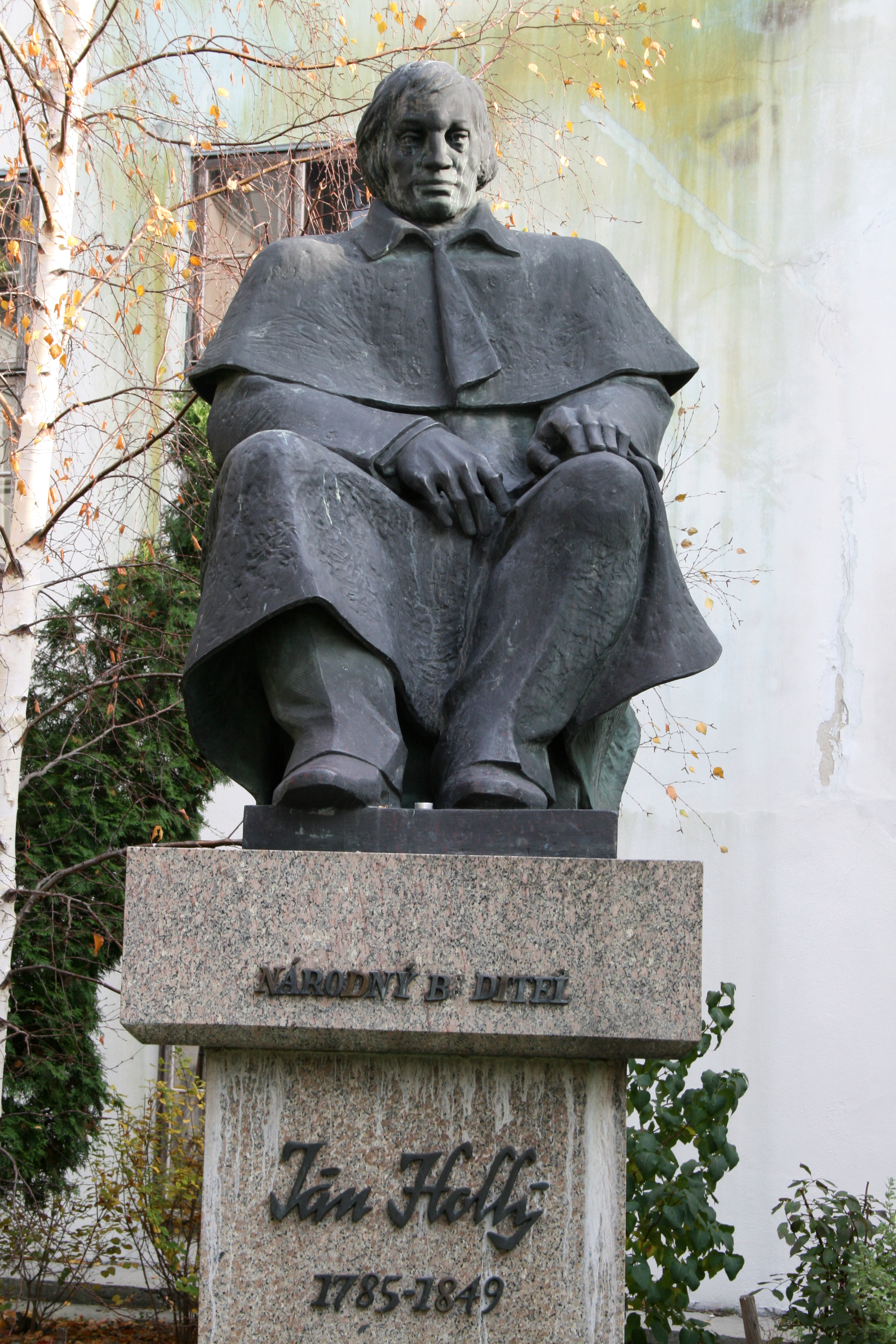 Bronzová plastika sediaceho básnika Jána Hollého z roku 1978 od Ervína Staníka východne od Dómu na Rudnayovom námestí